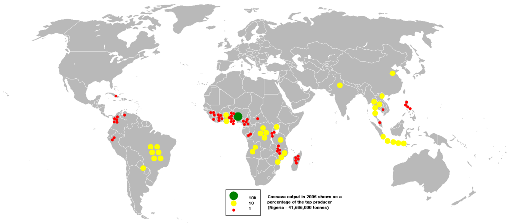 Cassava output in 2005